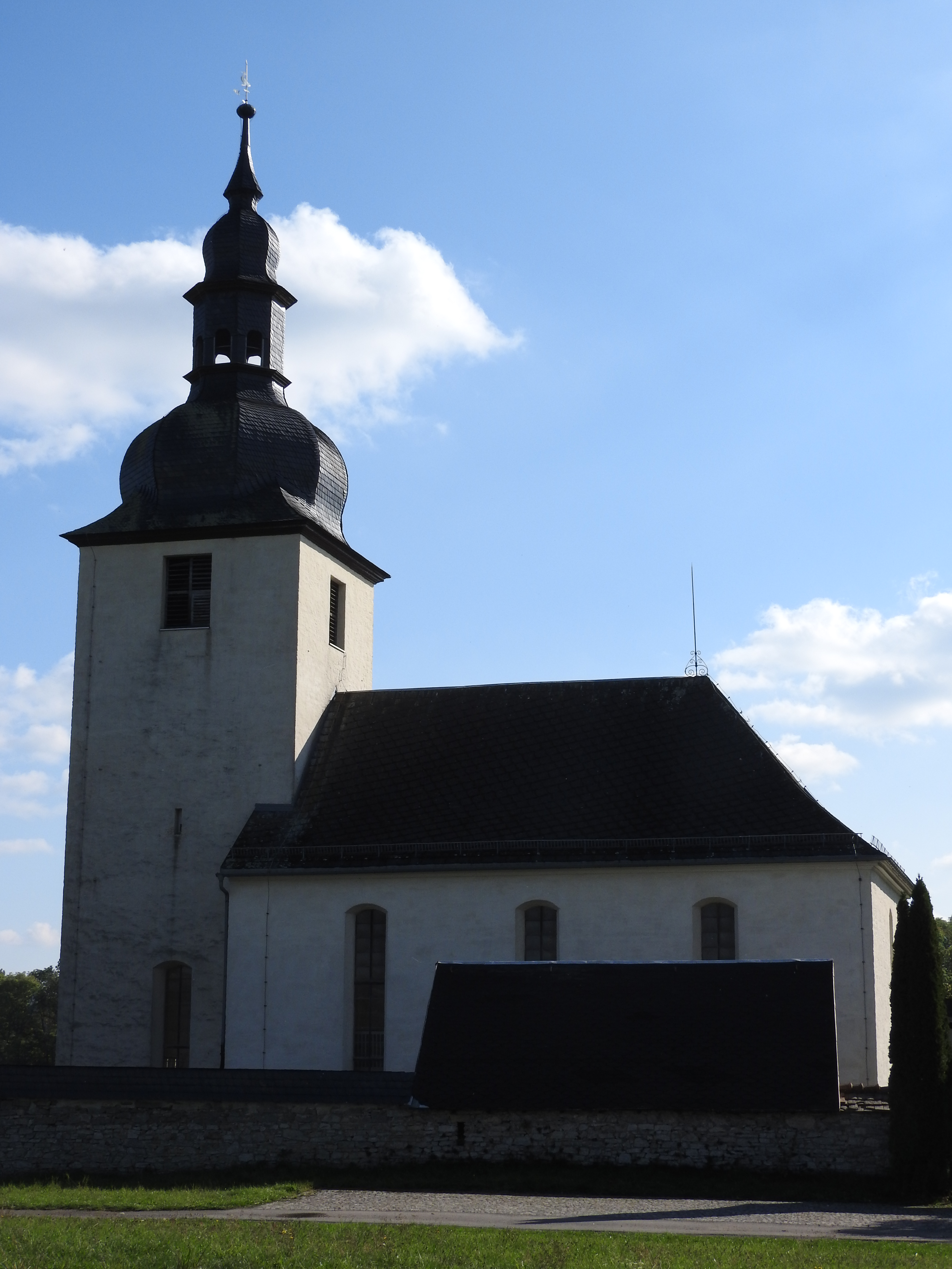 Kirche von Göschitz in Thüringen